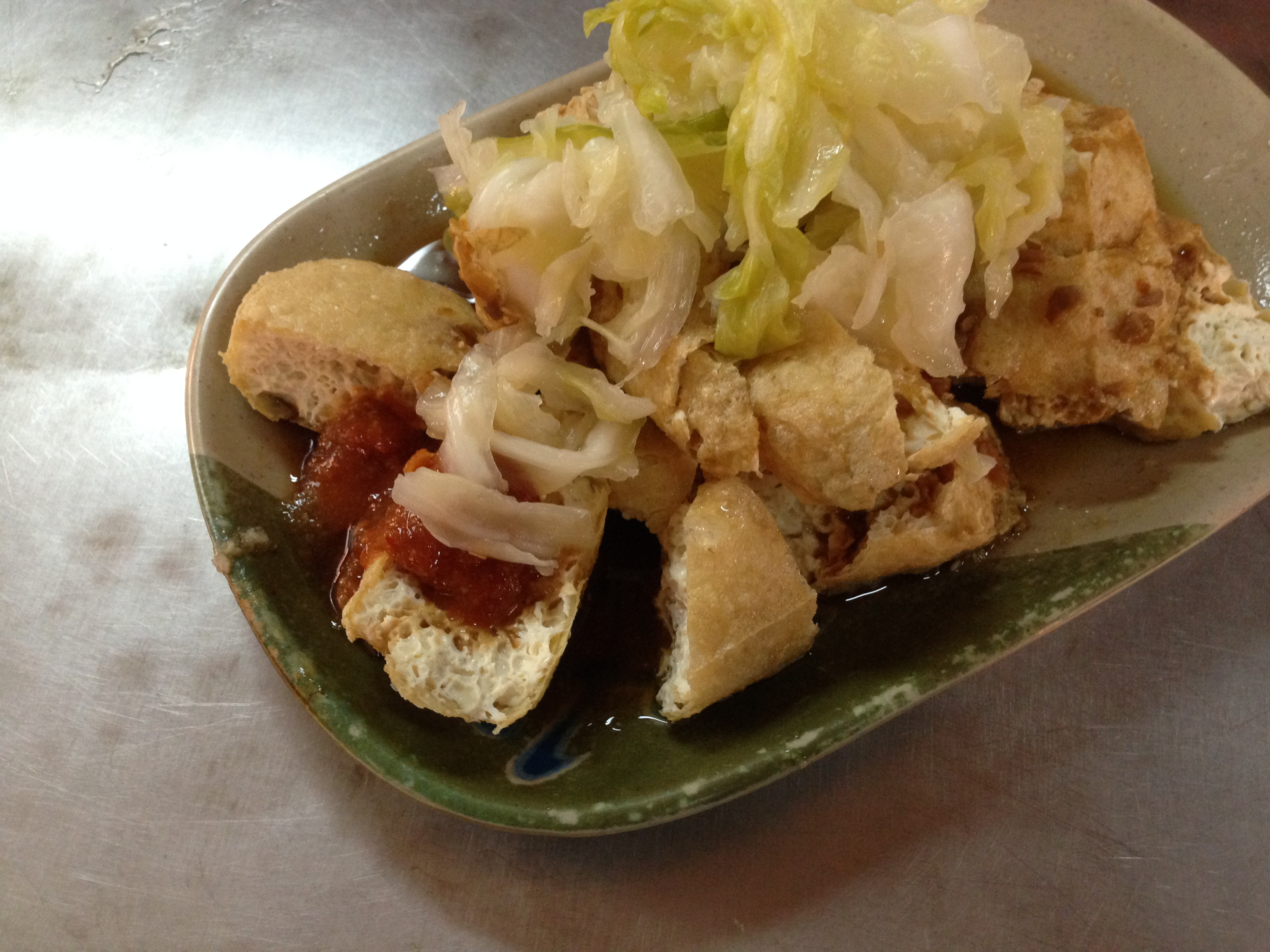 香酥臭豆腐。